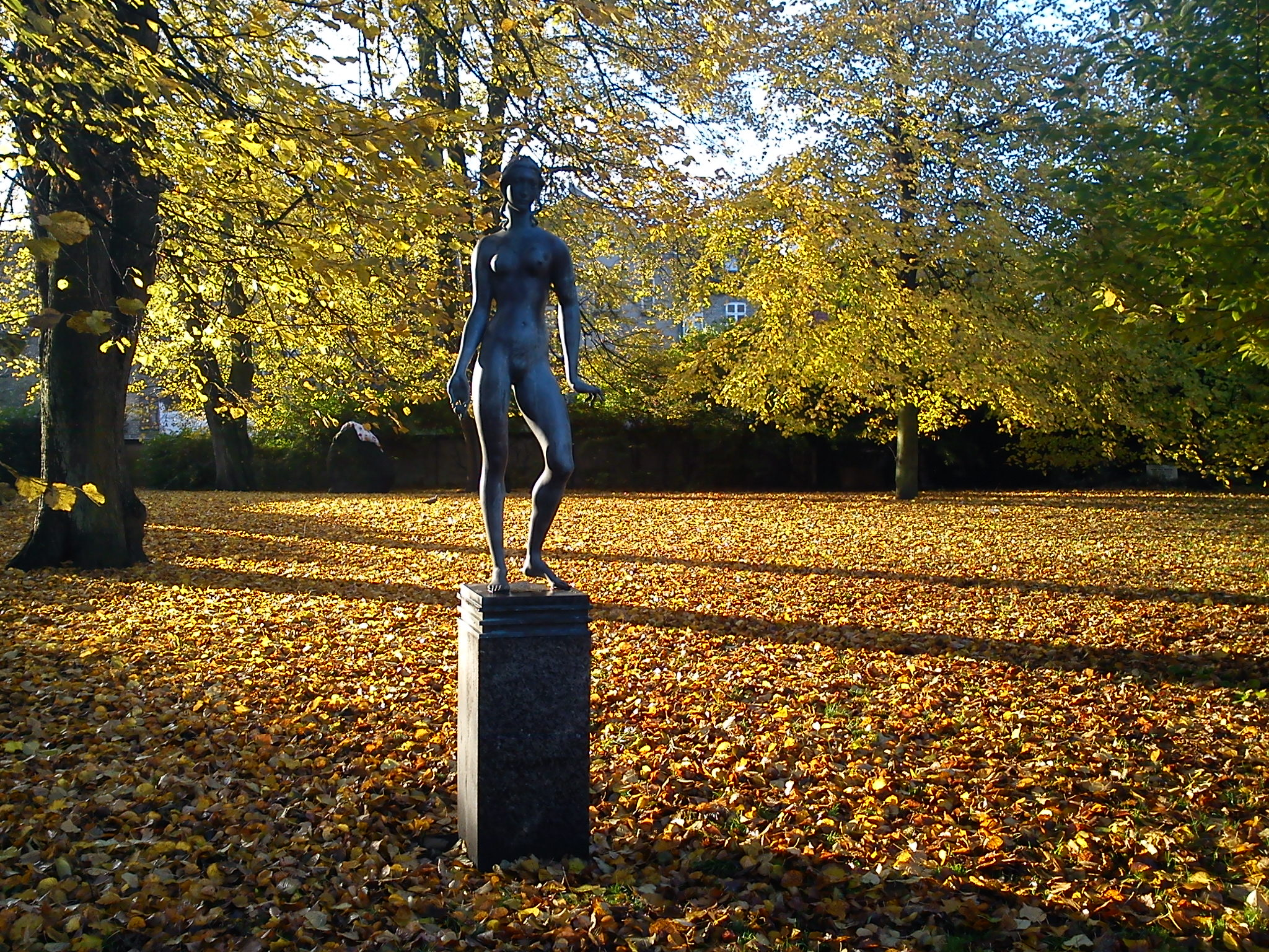 Efterårsscene fra Rådhusparken i Aarhus. Bronze skulpturen hedder Atalante.